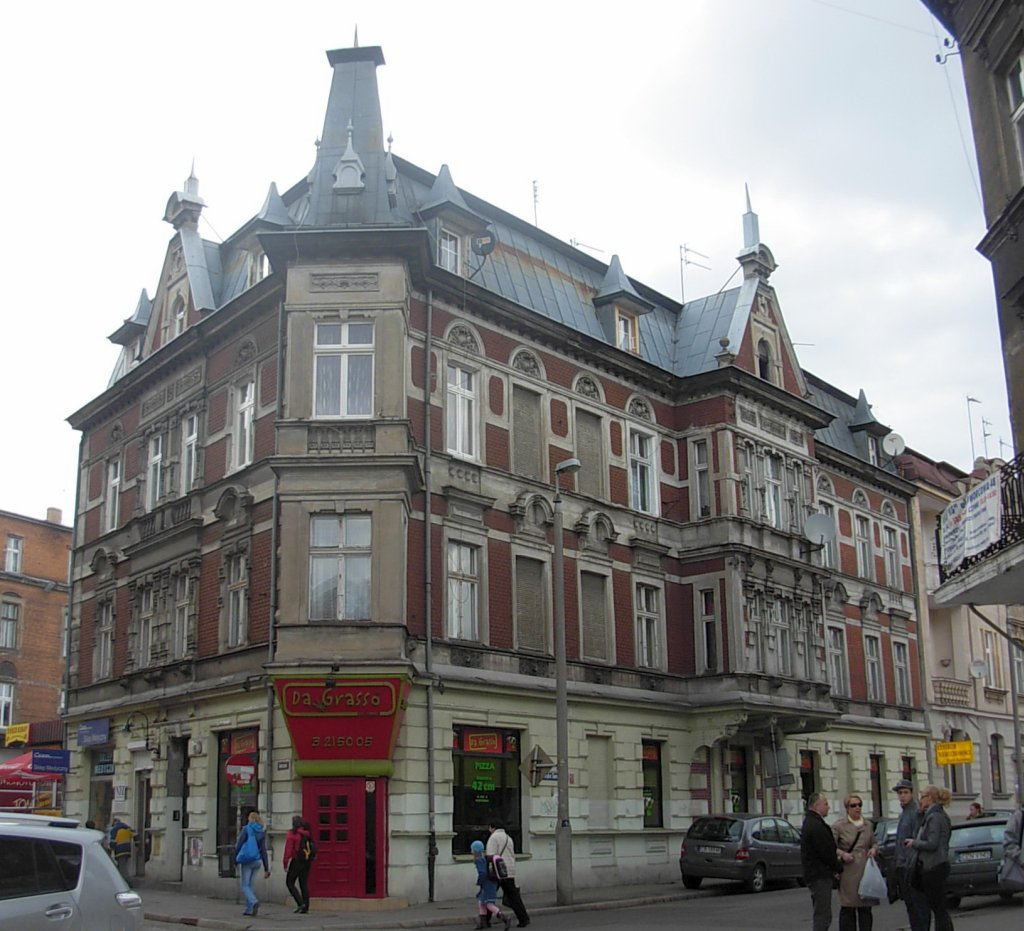 Kamienica ul. Dworcowa 50 w Bydgoszczy